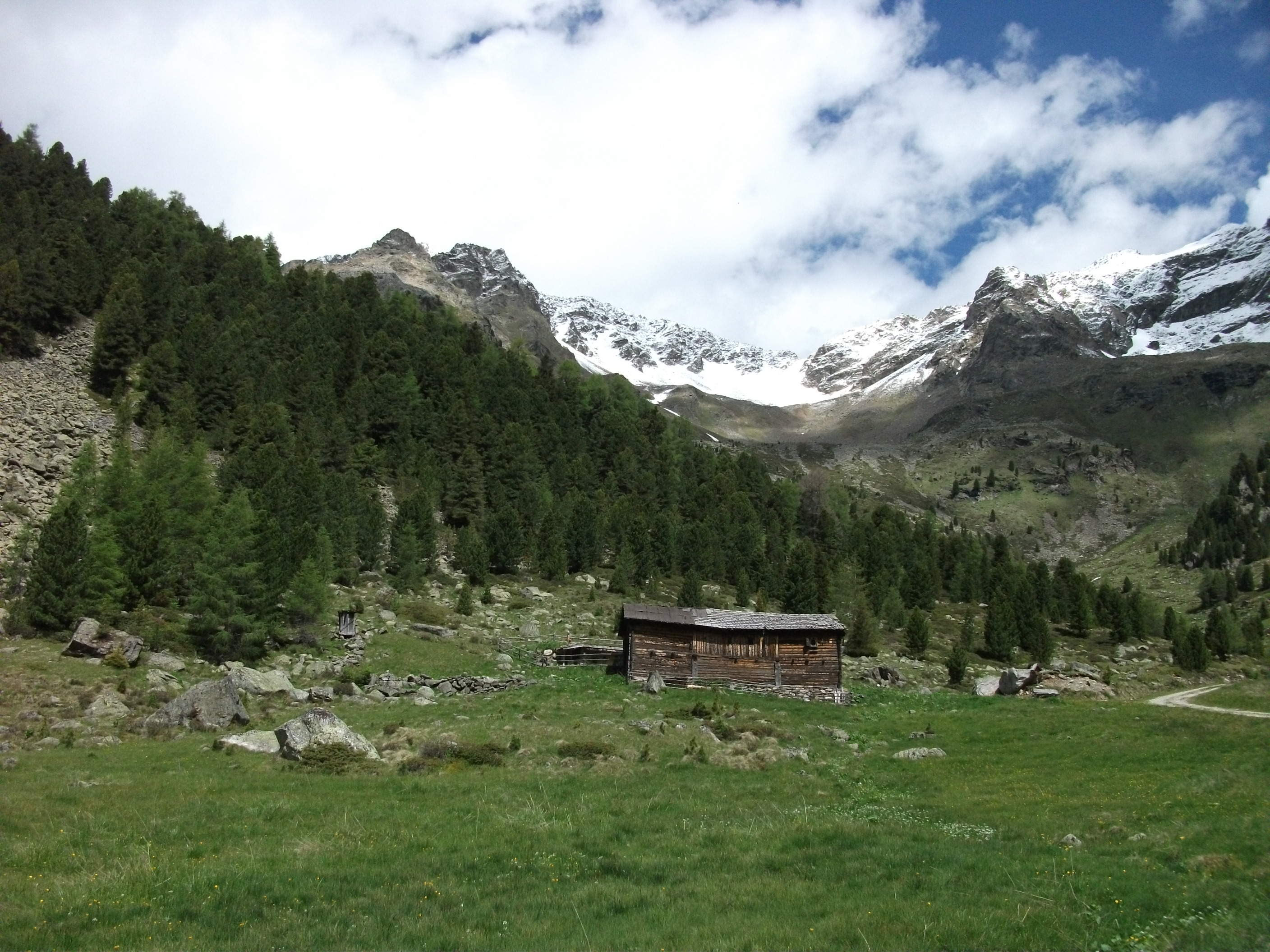 Unterwangeralm